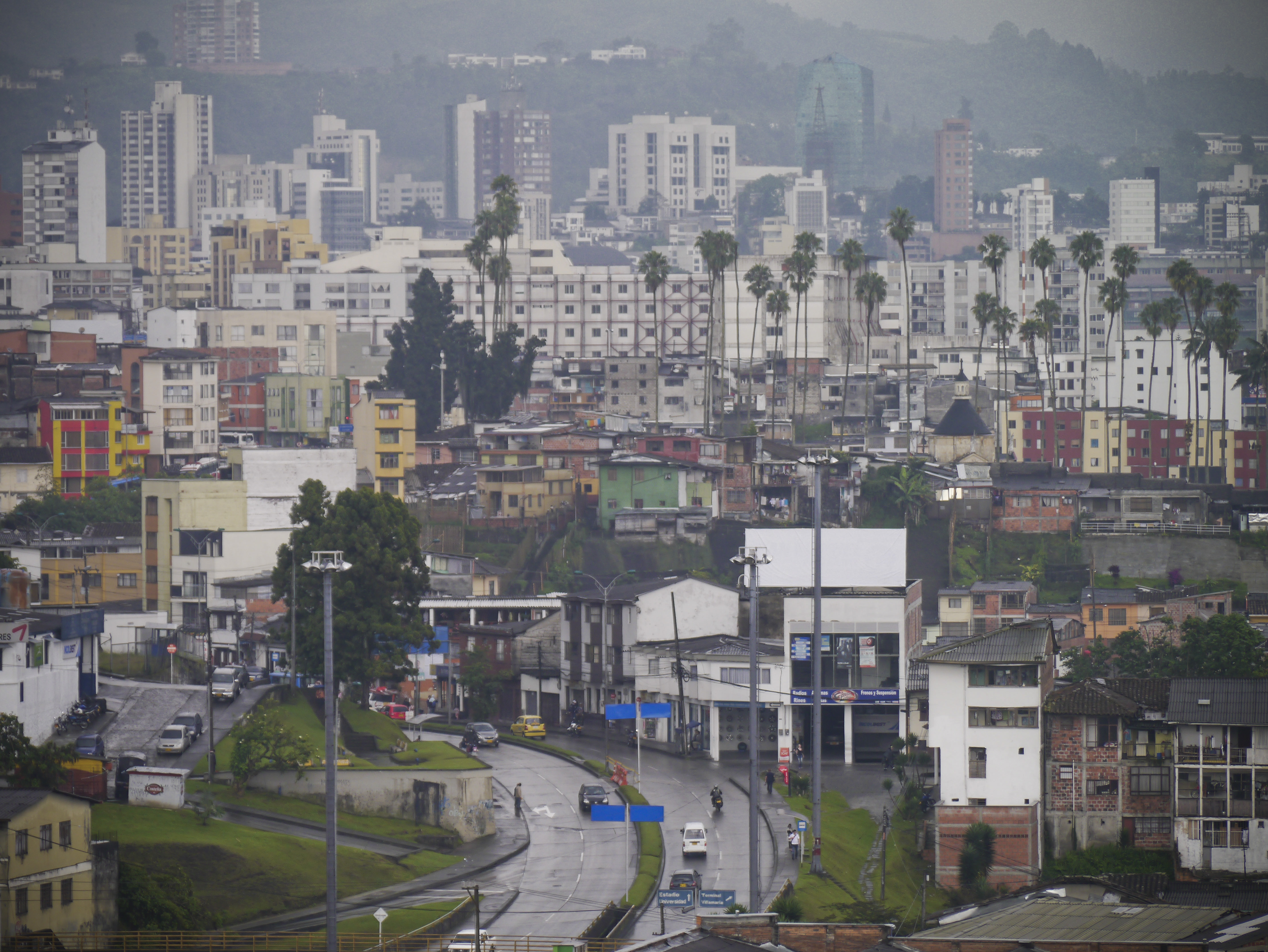 Manizales, Kolumbien